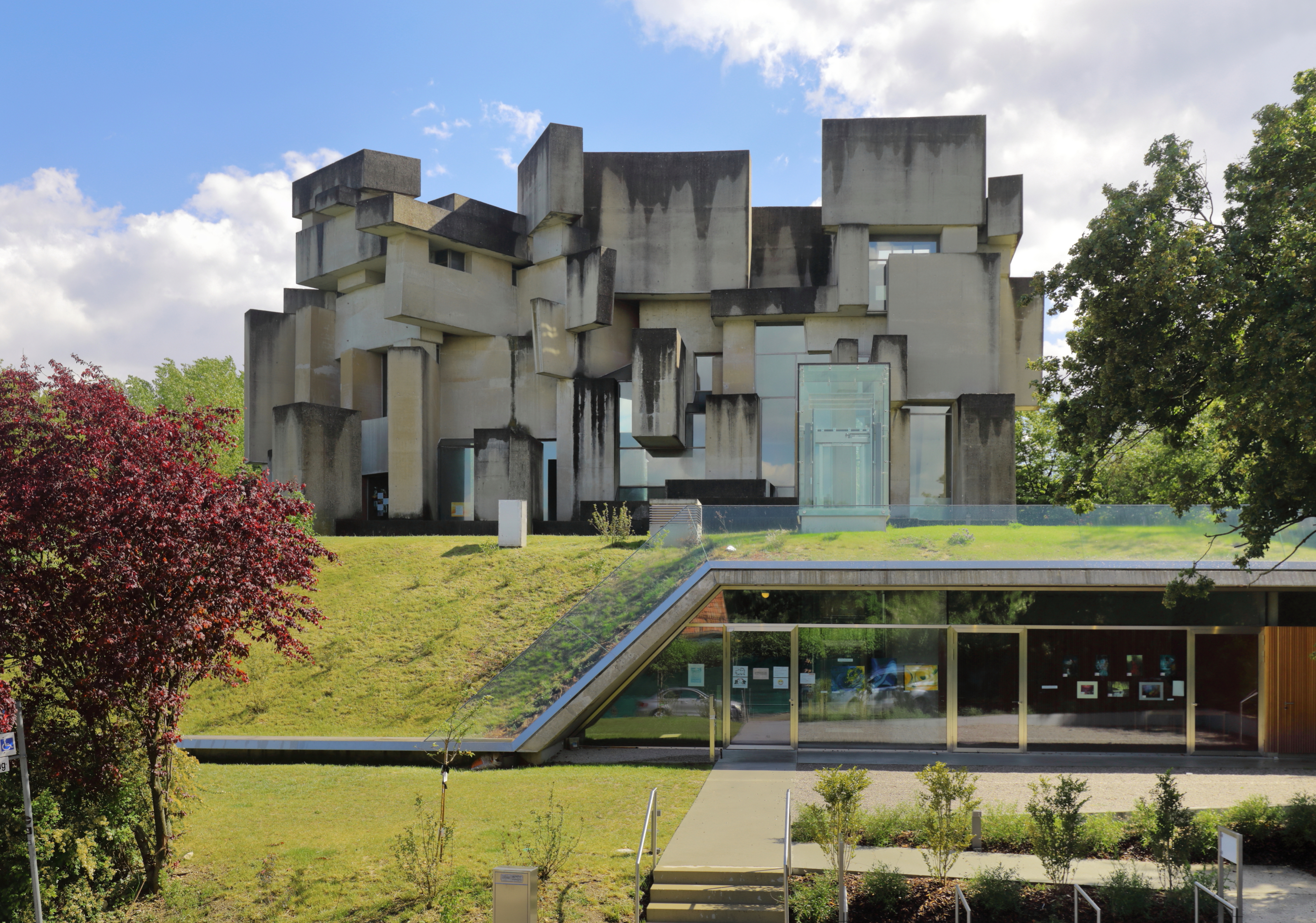 Nordansicht der Wotruba- bzw. Dreifaltigkeitskirche auf dem Georgenberg im Wiener Stadtteil Mauer des 23. Gemeindebezirkes Liesing mit Zubau und Lift.Die Kirche im Stil des Brutalismus wurde auf Initiative von Margarethe Ottillinger (1919–1992) und nach einer Idee des Künstlers Fritz Wotruba (1907–1975) vom Architekten Fritz Gerhard Mayr (* 1931) errichtet. Der Entwurf für die Kirche (152 Betonblöcke mit einen Gesamtgewicht von über 4000 Tonnen, ohne Symmetrie aufeinander geschachtelt, mit schmalen, verschieden hohen Fensteröffnungen) wurde von Wotruba 1964 präsentiert. Wegen großem Widerstand konnte man erst 1974 mit dem Bau beginnen und zwei Jahre später, am 24. Oktober 1976, erfolgte die feierliche Einweihung durch Kardinal Franz König.2018/19 wurde nach Plänen des Architekturbüro formann 2 puschmann (Christian Formann, Stefan Puschmann) ein Zubau, der lange umstritten war, um rd. eine Million errichtet. Dieser Zubau, der größtenteils im Hügel verschwindet, der die Kirche Fritz Wotrubas inszeniert, hindert die ursprünglichen Sichtbeziehungen zur Oberkirche nur gering und ermöglicht durch den dabei errichteten Lift einen barrierefreien Zugang zur Ober- und Unterkirche.